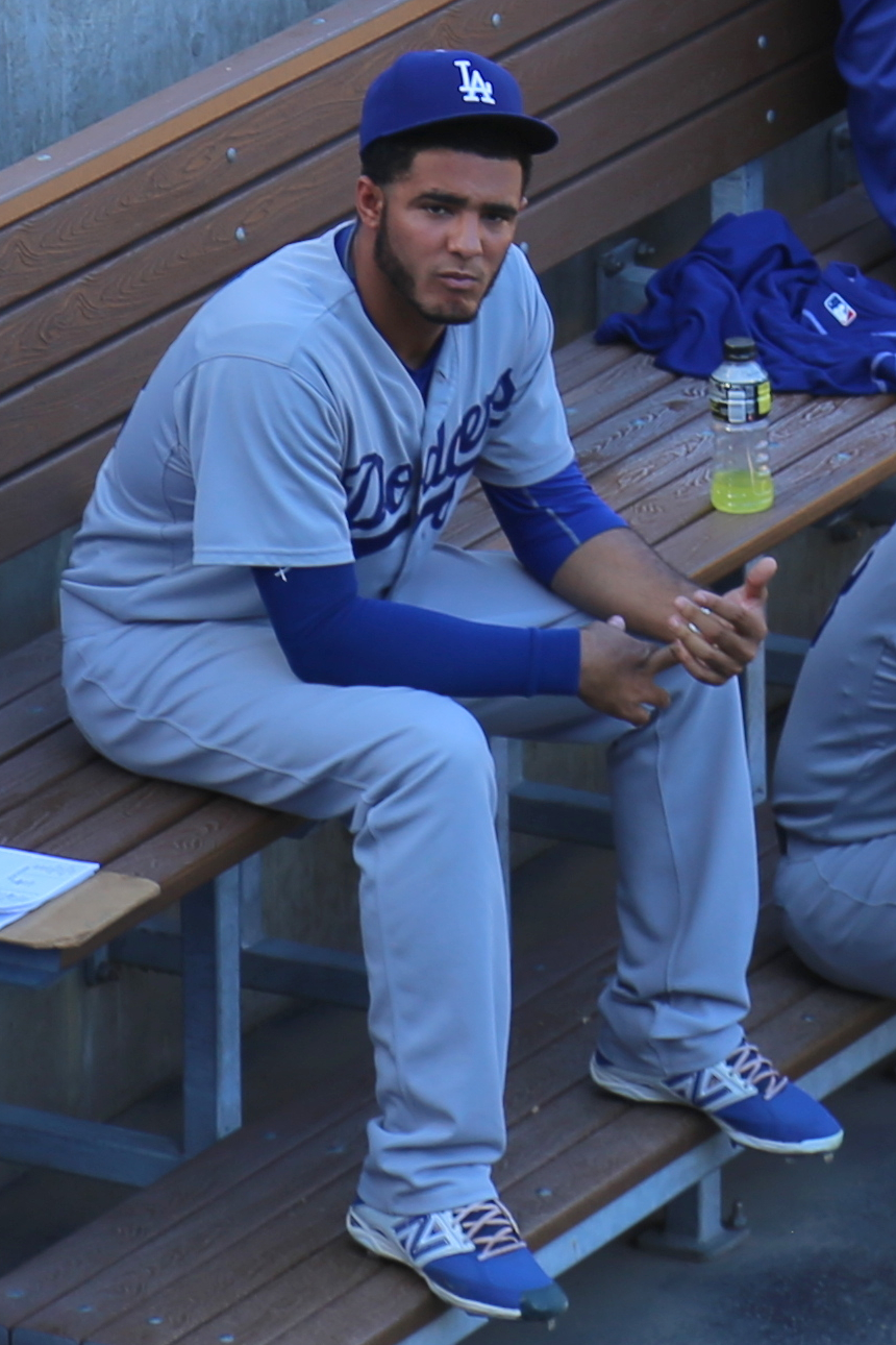 Yimi García